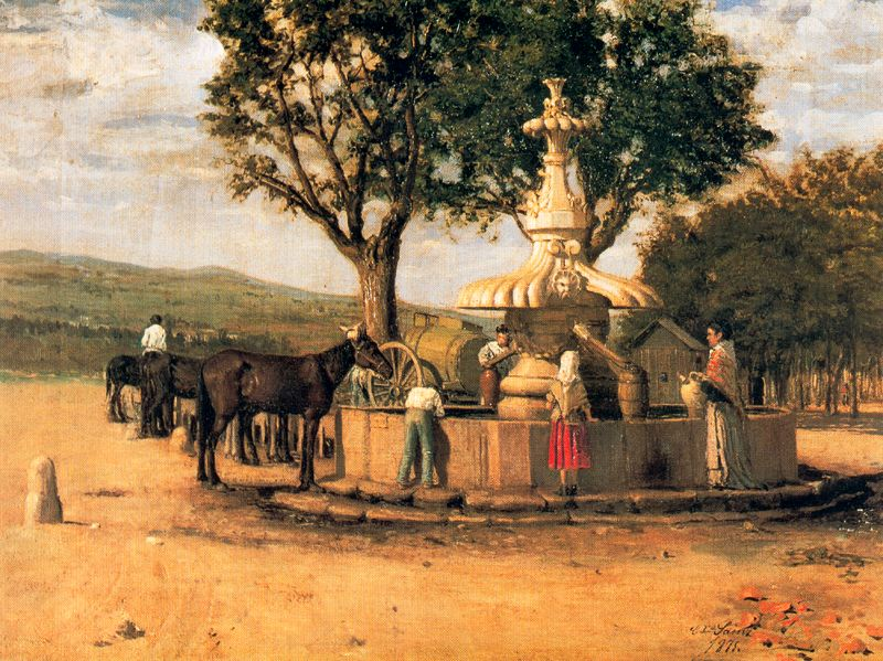 Fuente pública en Madrid o Aguadores en una fuente de Madrid, óleo de Casimiro Sainz y Saiz (1853-1898) en 1875, conservada en el Museo de Historia de Madrid, ambientando una de las cuatro fuentes barrocas del Paseo de las Delicias. Casimiro Sáinz fue un paisajista santanderino (Cantabria, España) con una destacable obra de paisajes y realismo costumbrista. Bibliografía: Casimiro Sáinz Sanz en el C.E.M.